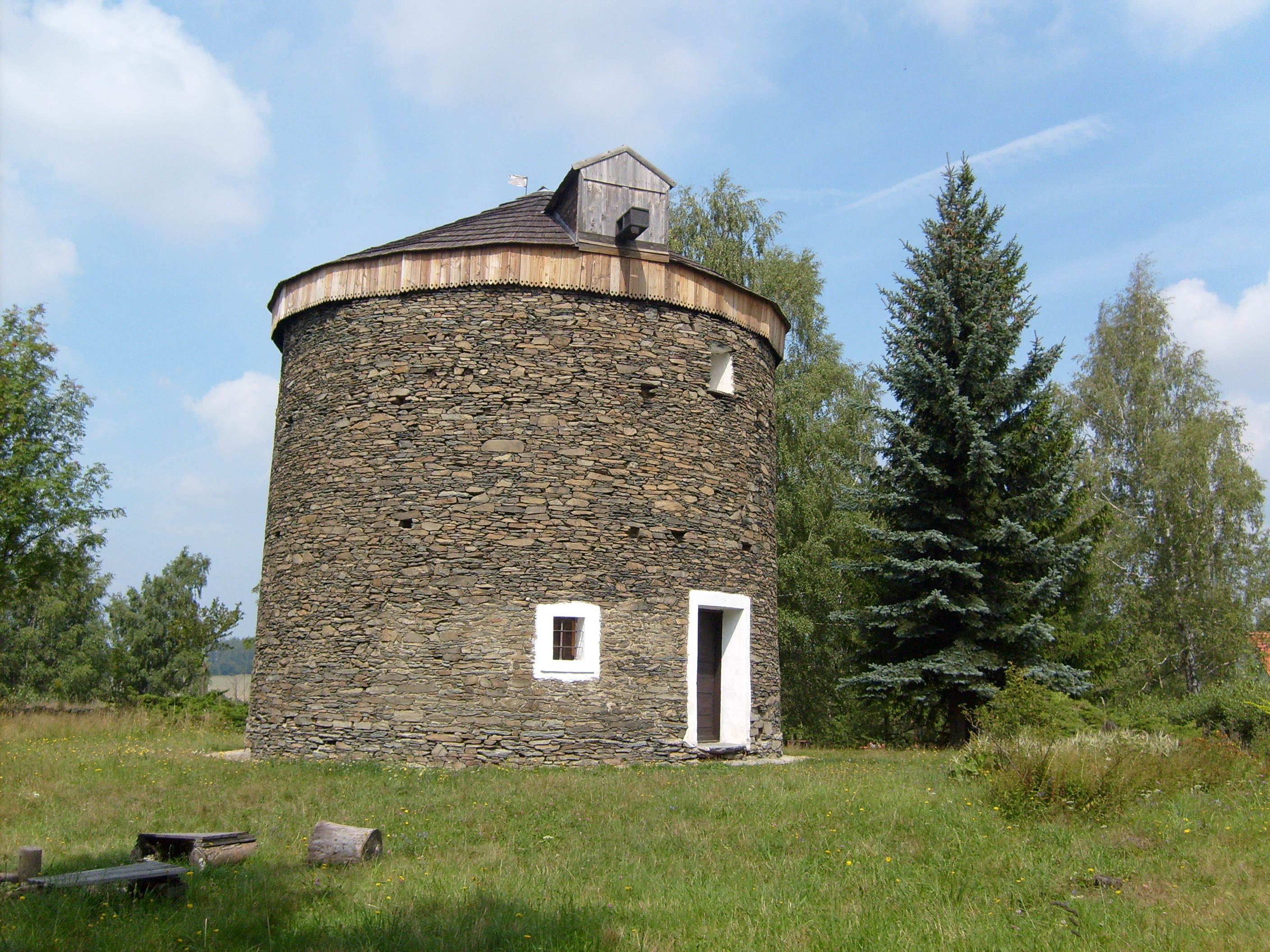 Větrný mlýn, Kořenec, South Moravian Region, Czech Republic